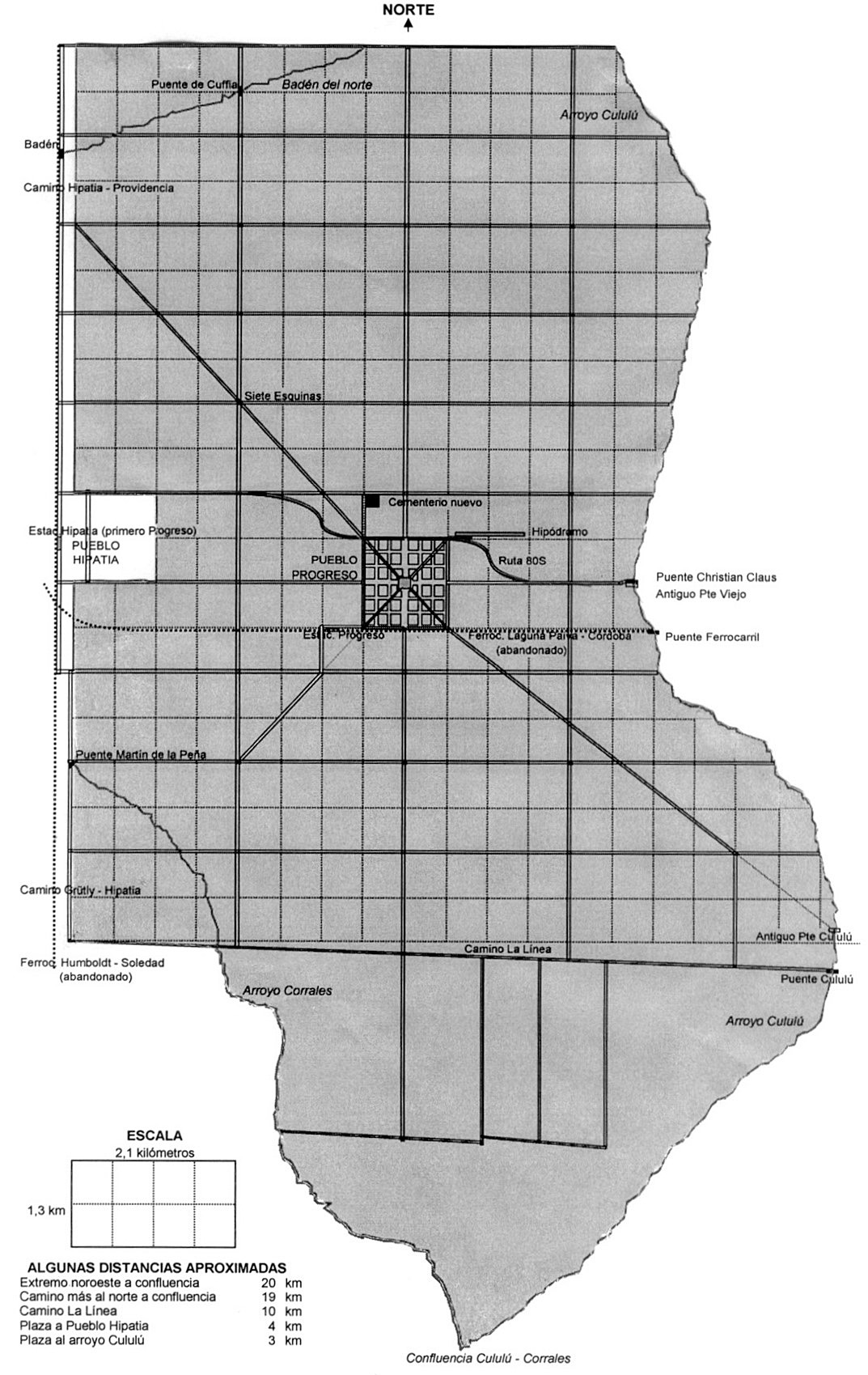 Mapa demostrativo de la forma actual del distrito con sus vías de comunicación y principales caracteristicas geográficas